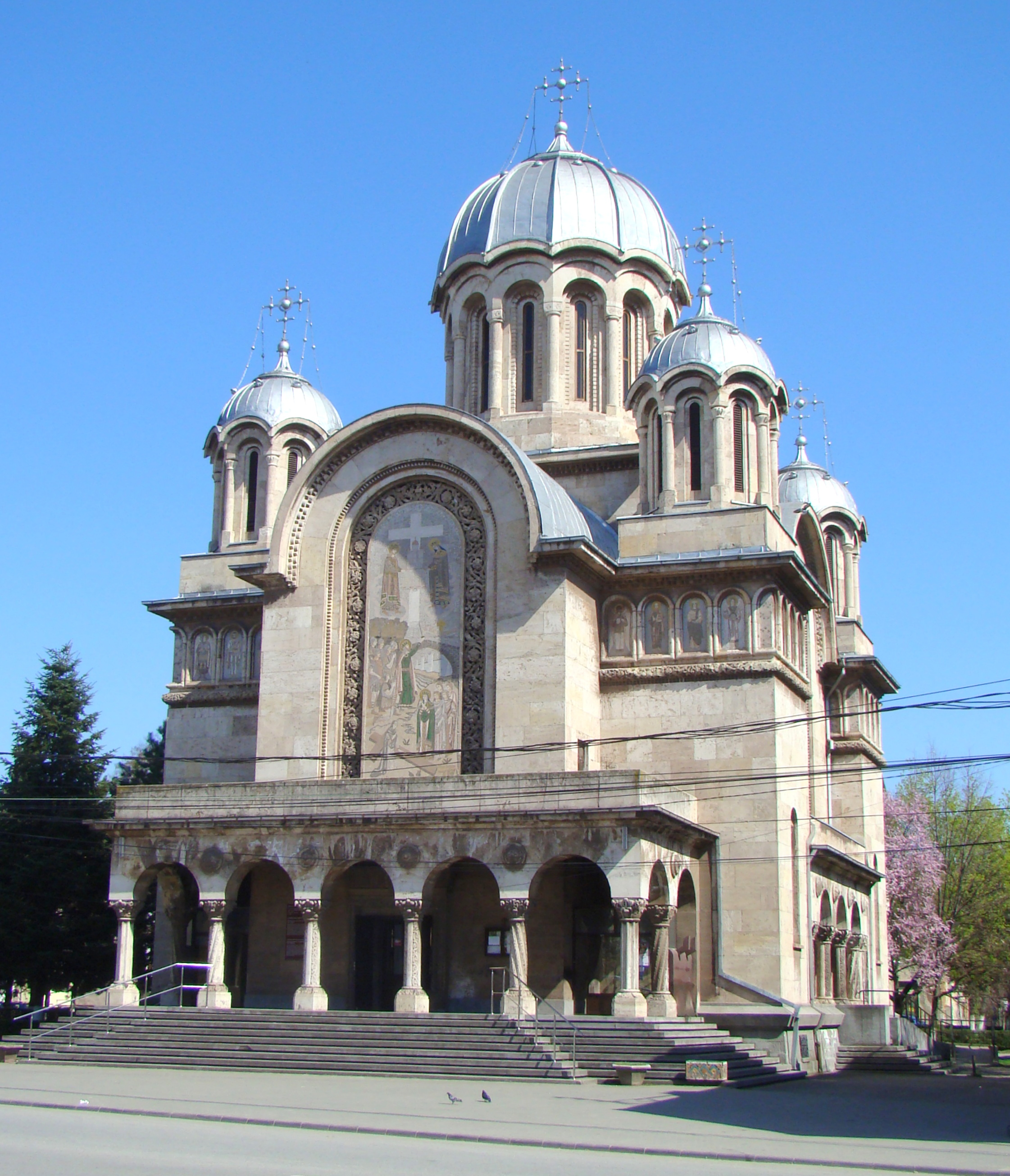 Ansamblul urban „Piața Libertății”, municipiul Hunedoara